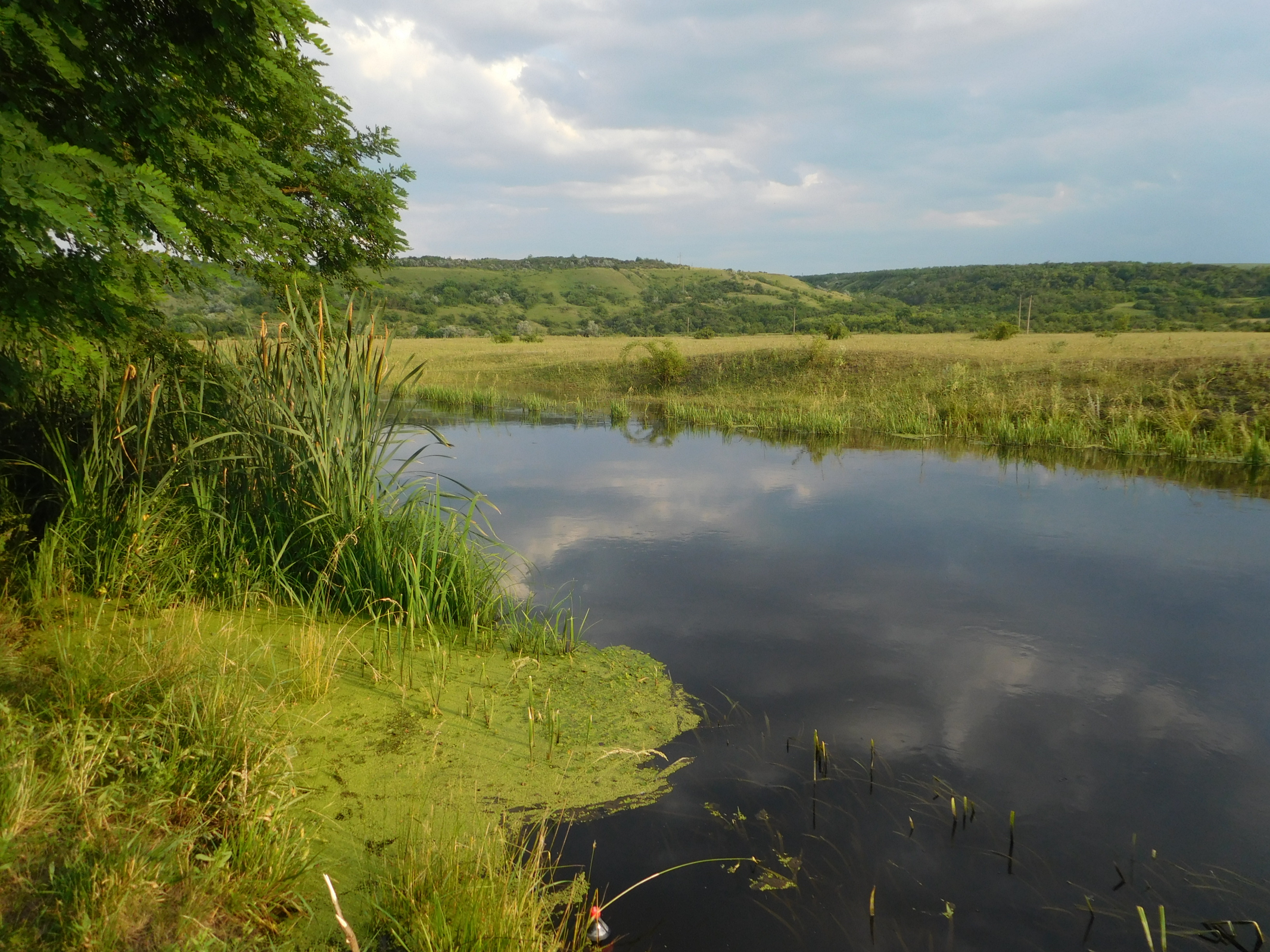 річка Кодима в с. Бобрик Перший, Любашівський район, Одеська область